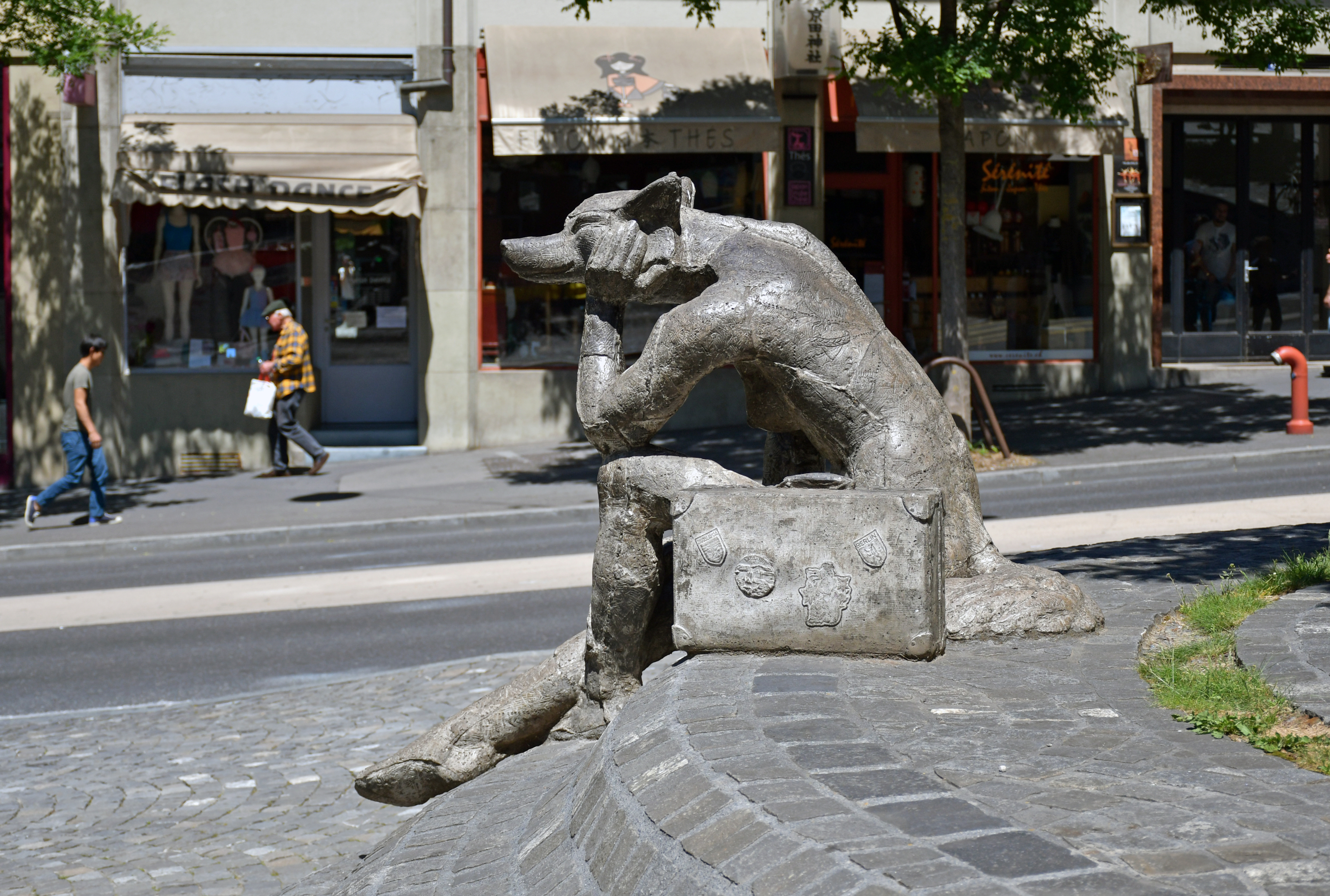 Femrenarde à la valise, sculpture de 2014 en ciment polychrome de Nikola Zaric, située dans le secteur du Rôtillon, à Lausanne (Suisse).